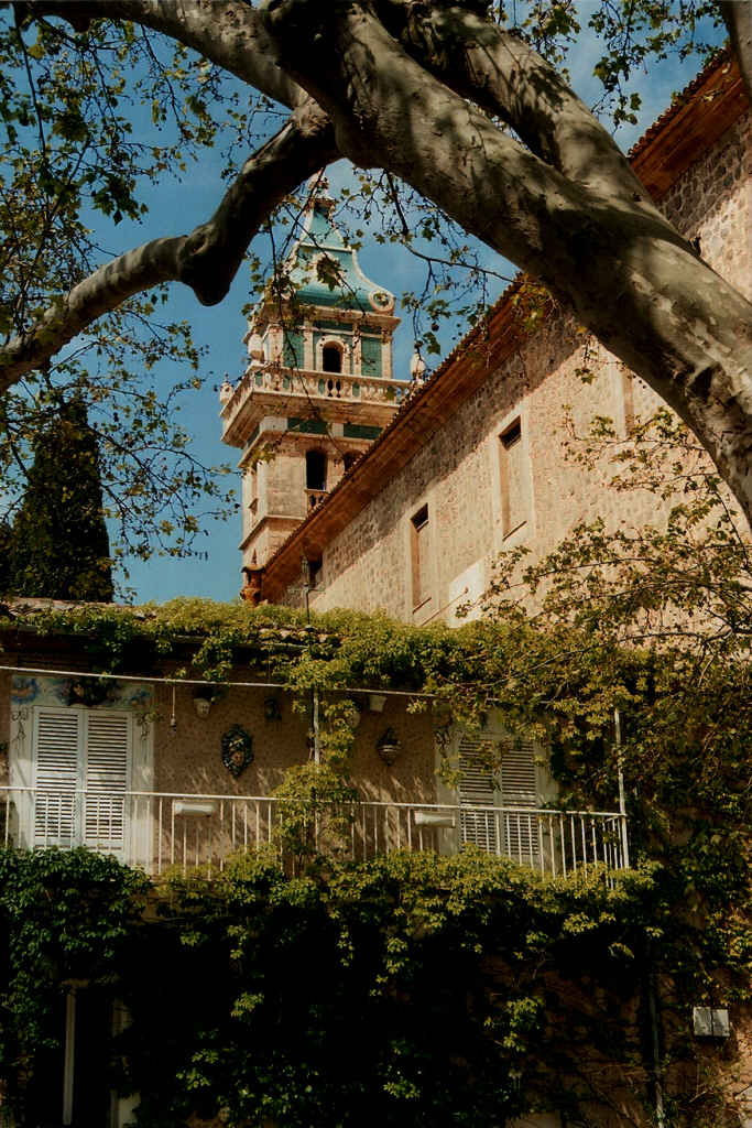 Kloster in Valldemossa, Spanien, Mallorca